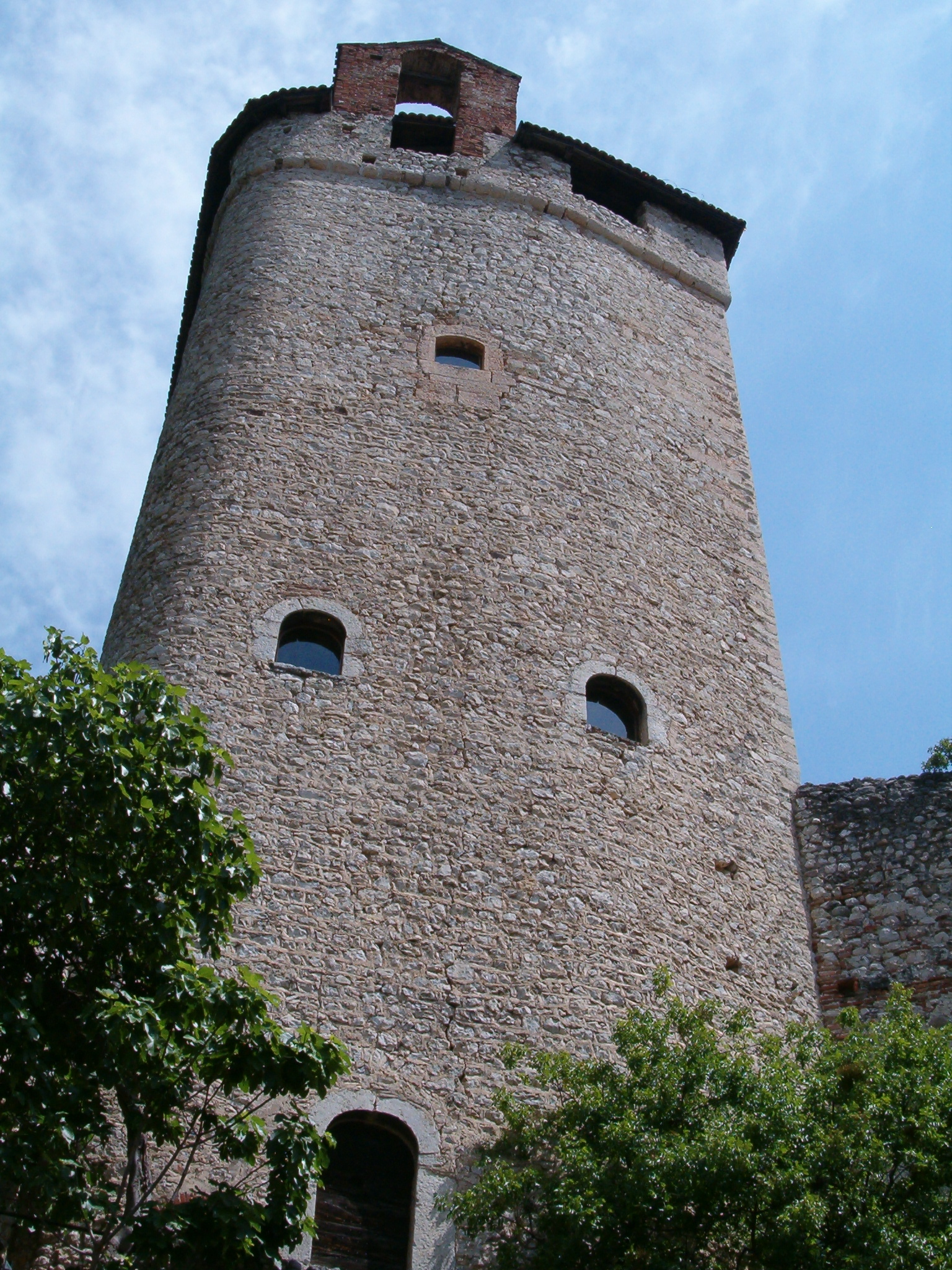 Castello di Avio (Trentino, Italy)